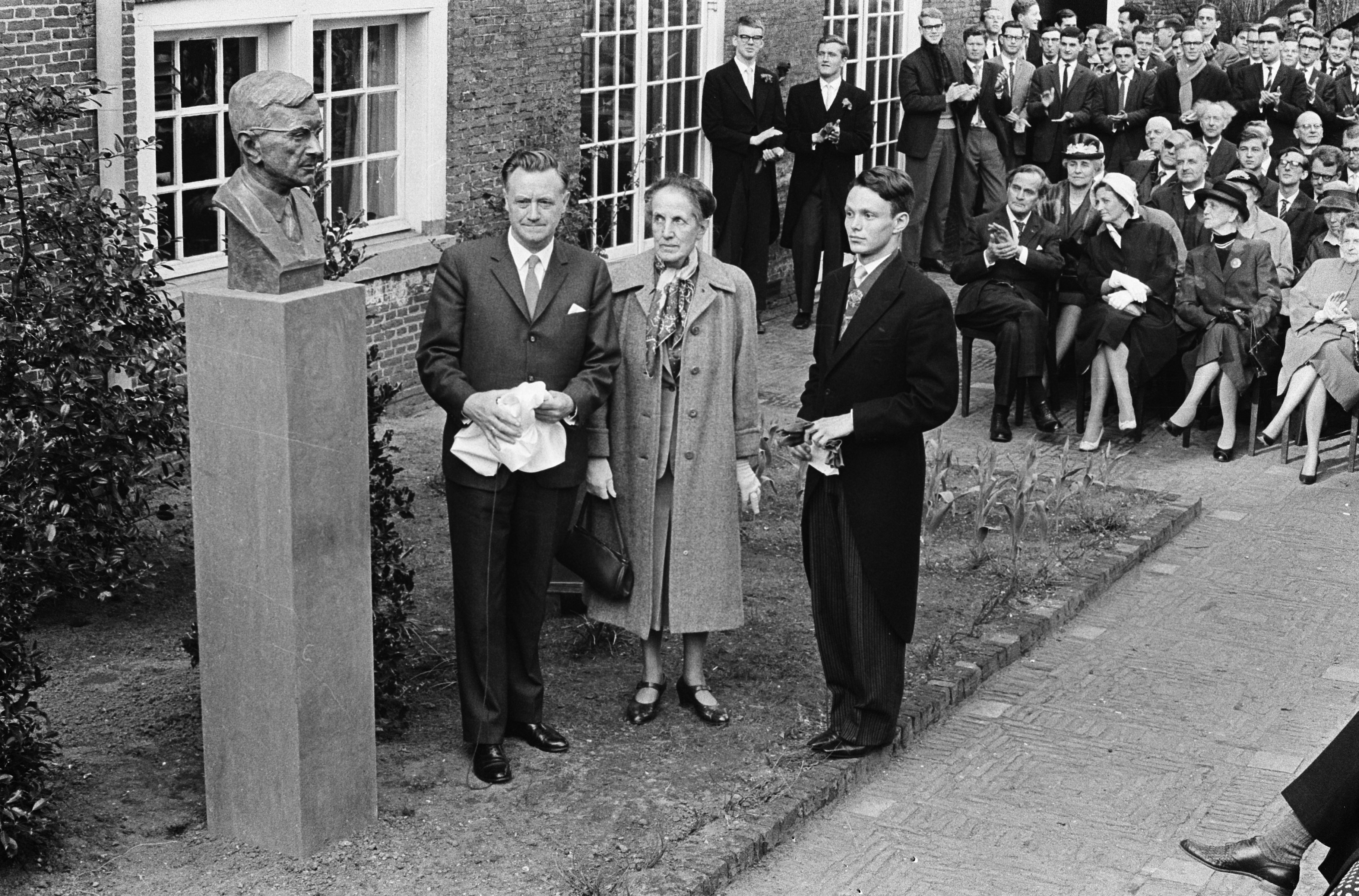 De Roomskatholieke Studentenvereniging "Sanctus Virgilius" heeft de gemeente Delft een borstbeeld aangeboden voorstellende letterkundige Dirk Coster. 23 april 1963. Eerste rij links: Adriaan Roland Holst